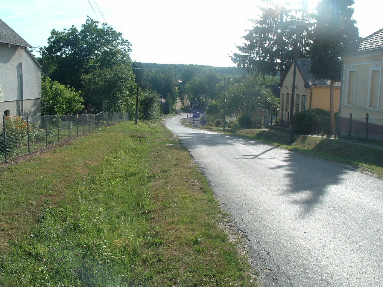 Alsótelekes, Telekes, Hungary